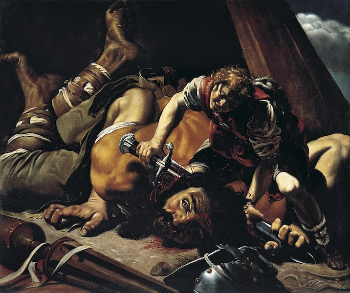 La obra representa a David, el futuro rey de Israel, cortando la cabeza del gigante filisteo Goliat.